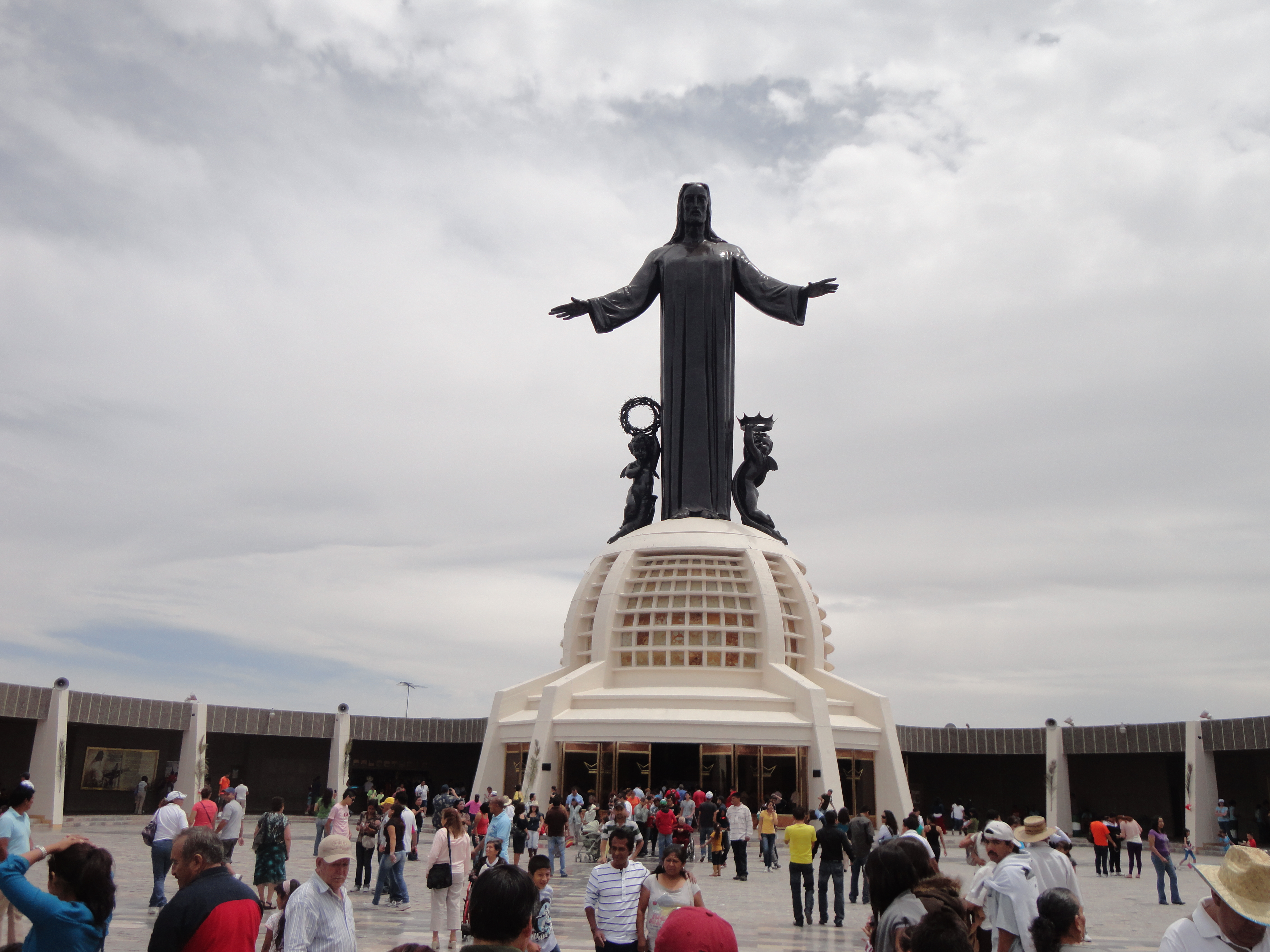 Cristo Rey - Cerro del Cubilete - Silao, Guanajuato, México.